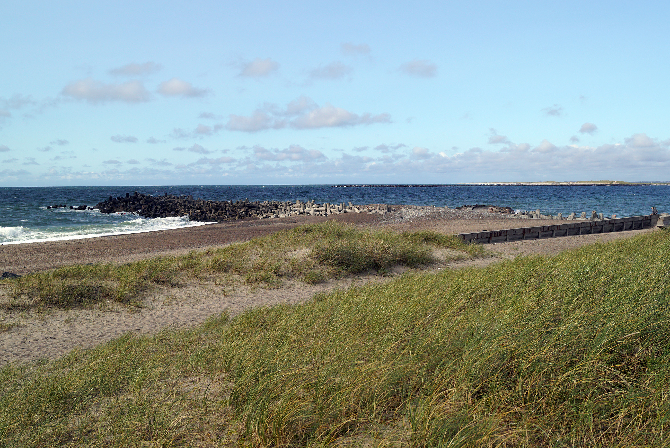 Thyborøn Kanal, vestenden ved Nordsøen, set fra syd